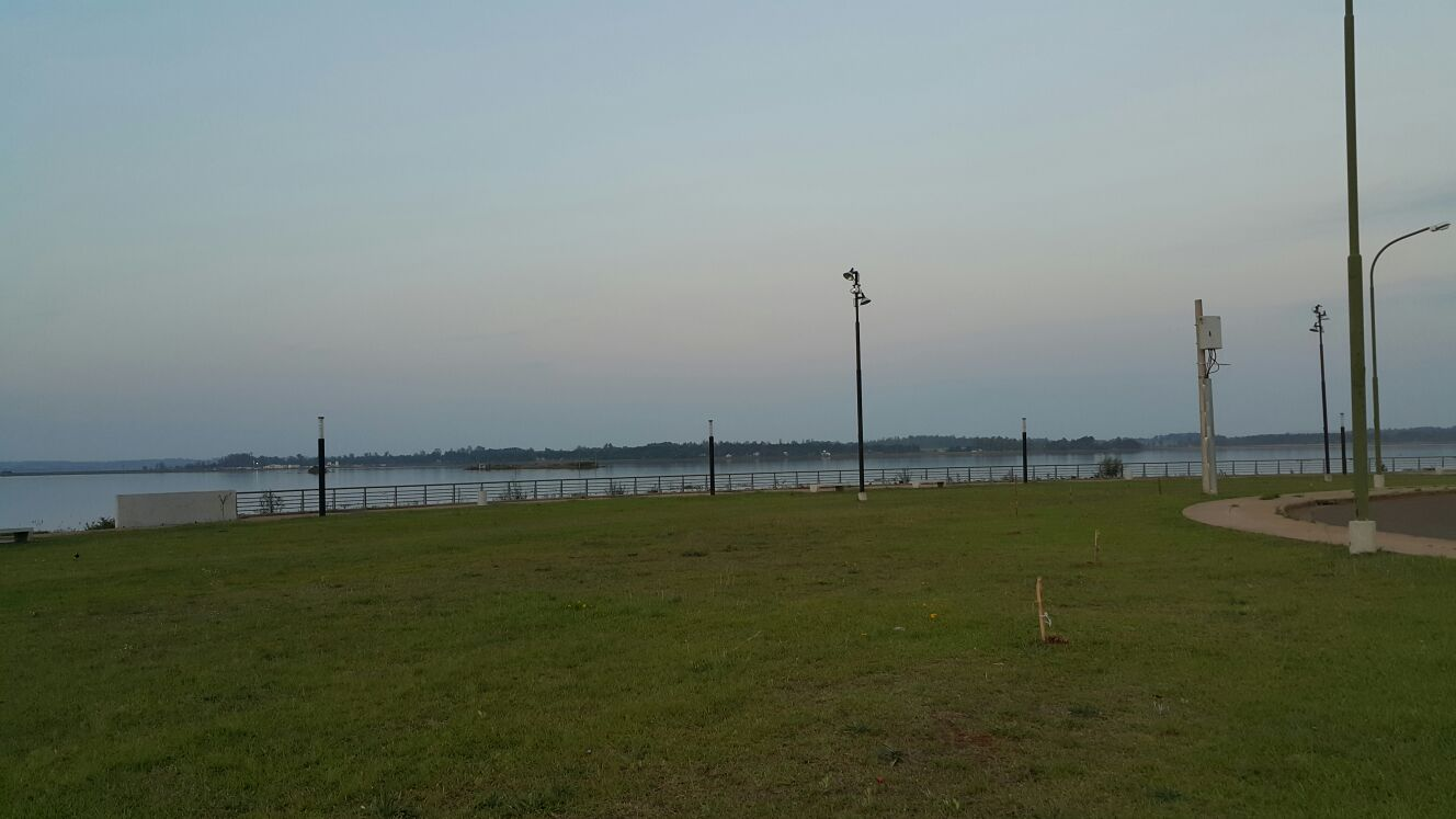 Vista actual de la costanera